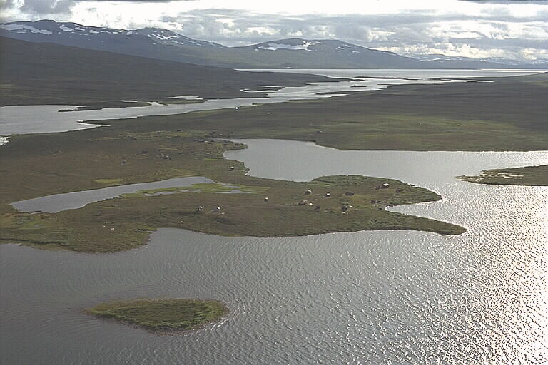 Mot sydväst. Laponia Motiv: Sállohávrre (Sallohaure) Nyckelord: Flygbilder, Riksintressen, Världsarv Kategori: Fjällbygd Mot sydväst. Laponia.